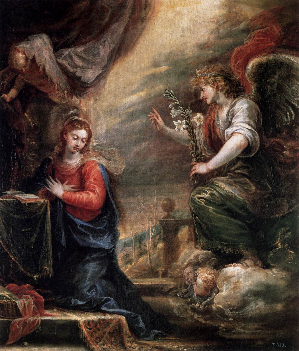 La obra representa el momento en que el arcángel San Gabriel anunció a la Virgen María que sería la madre de Jesucristo, el Mesías.